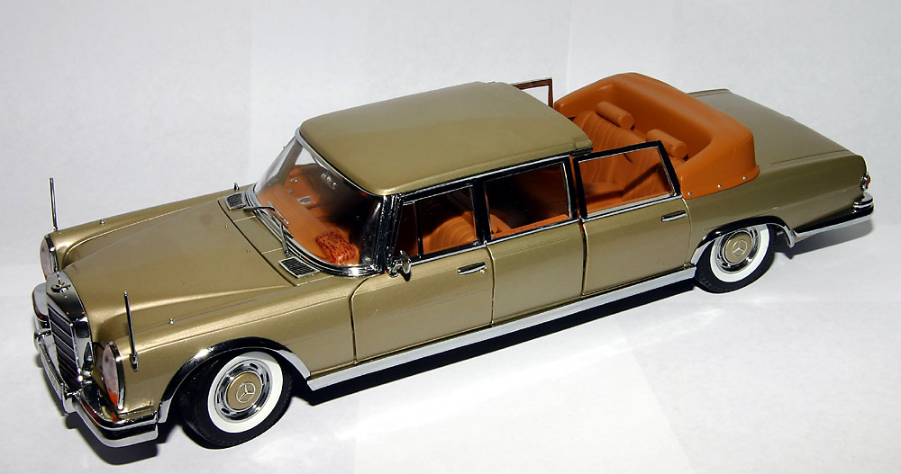 Modell eines Mercedes 600 Landaulet fotografiert von: Softeis